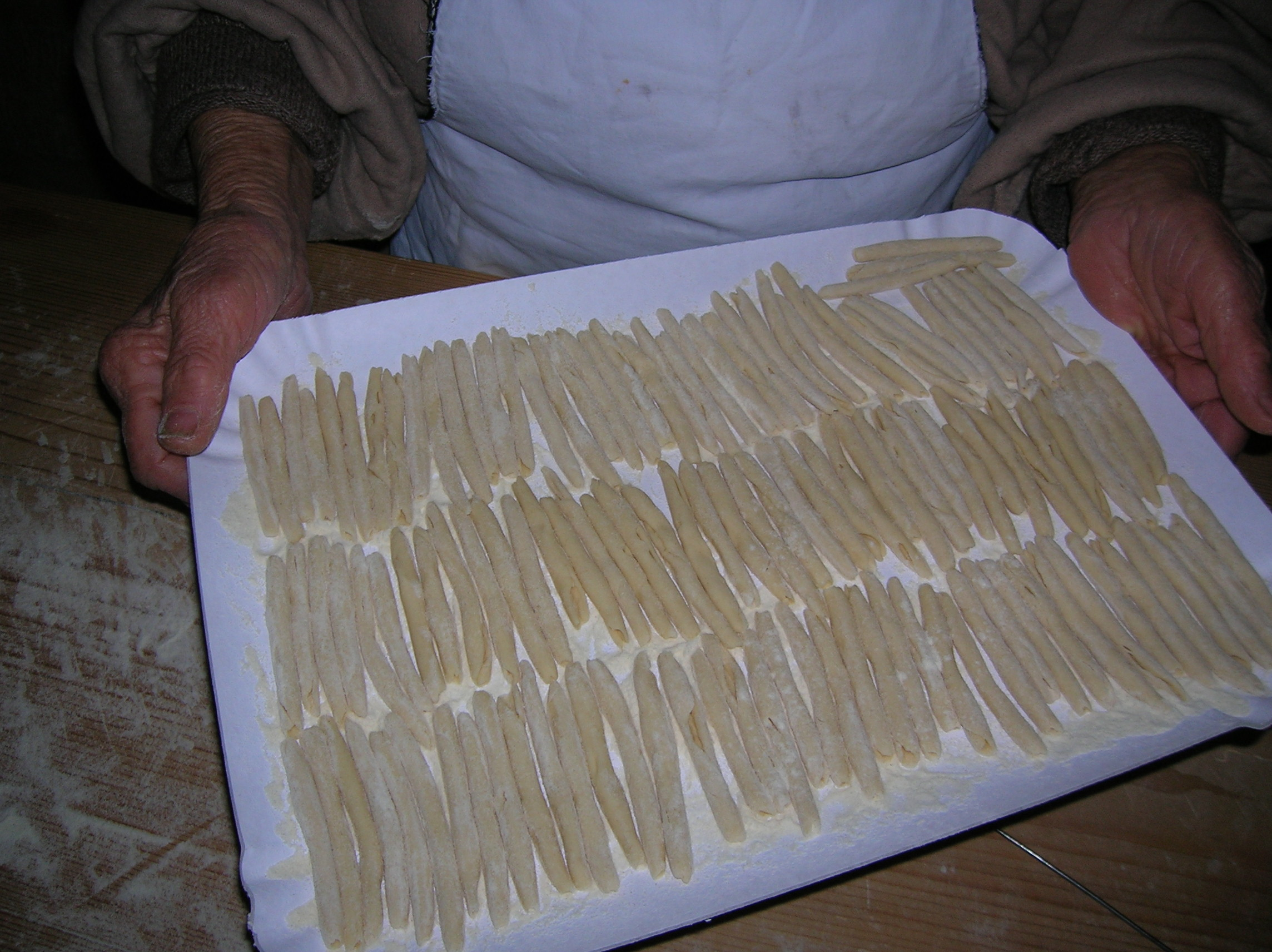 Alessandro Signore; Maccheroni o minchiareddhi: pasta tipica salentina